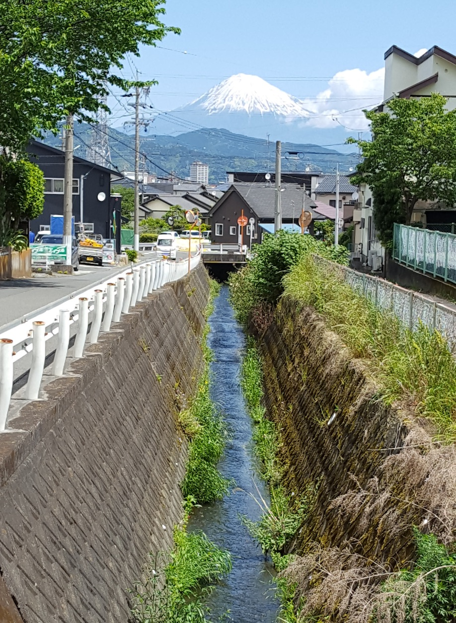 常念川上流（清水区南矢部）